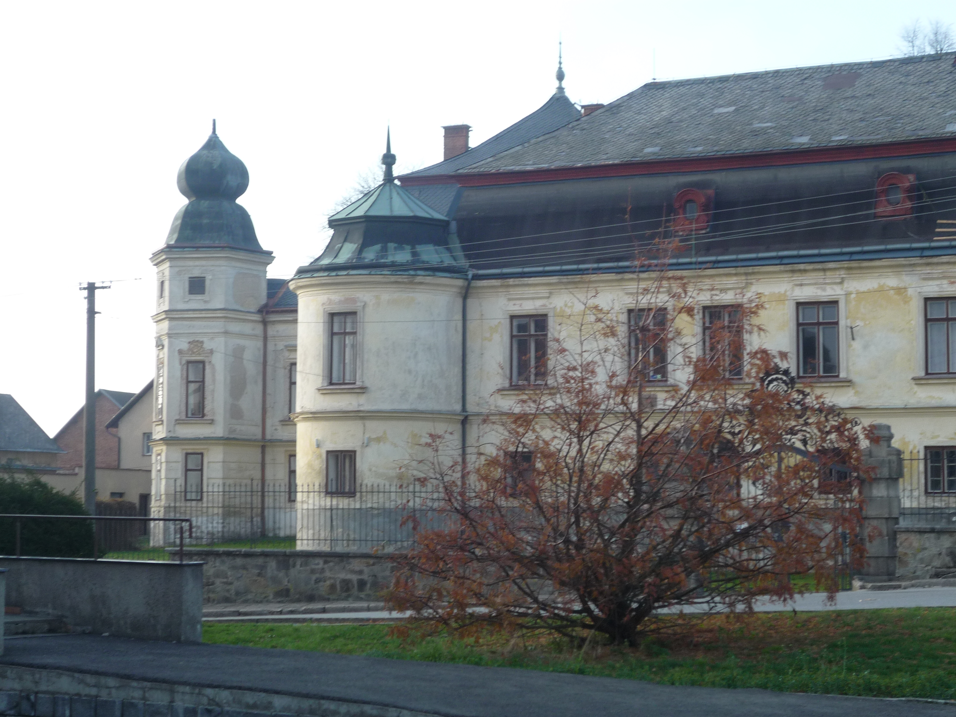 Autor fotografie Jiří Zelenka. Zámek Větrný Jeníkov. Novobarokní zámecká budova o třech jednopatrových křídlech s čestným dvorem a hospodářským zázemím vznikla v letech 1904-07 rozsáhlou přestavbou původní barokní stavby. Areál zámku stojící na místě středověké tvrze vymezuje ohradní zeď se třemi branami.Větrný Jeníkov. Okr.Jihlava. Kraj Vysočina. Czech Republic.